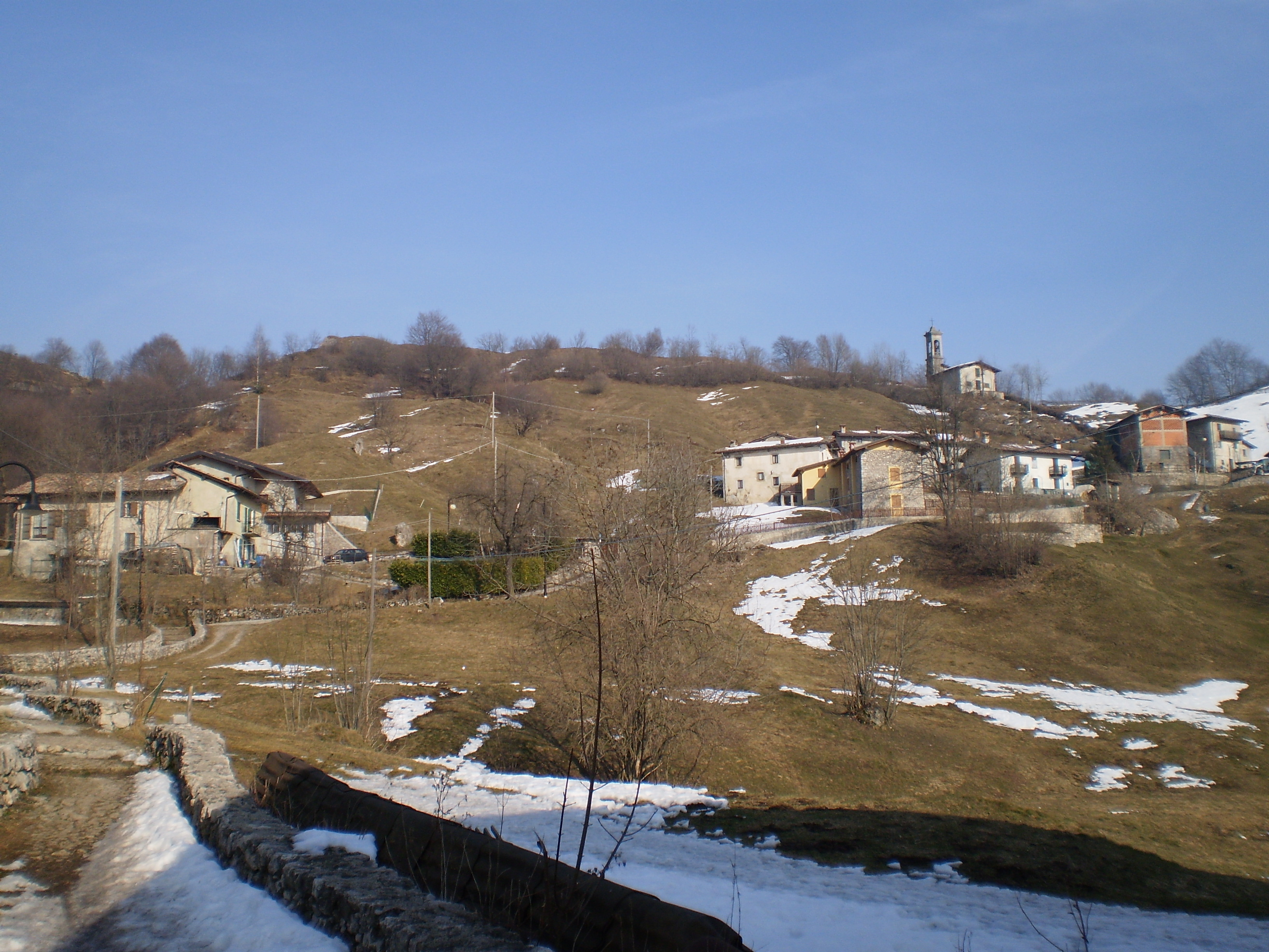 Salmezza, fraz. di Nembro (BG), Italia